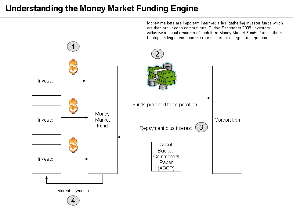 Money Market Funding Engine.